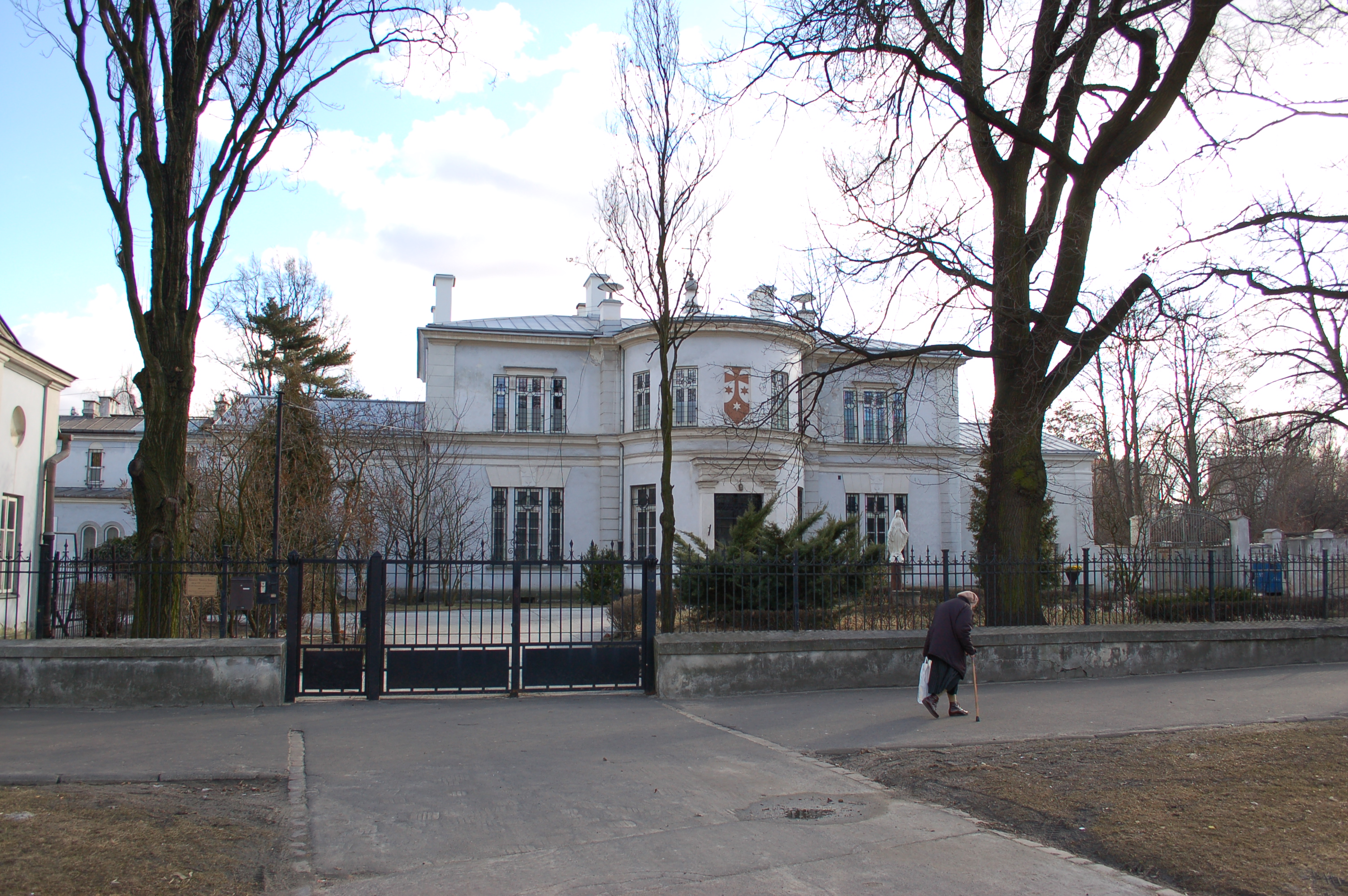 Biernacki-Palast Warschau Wola